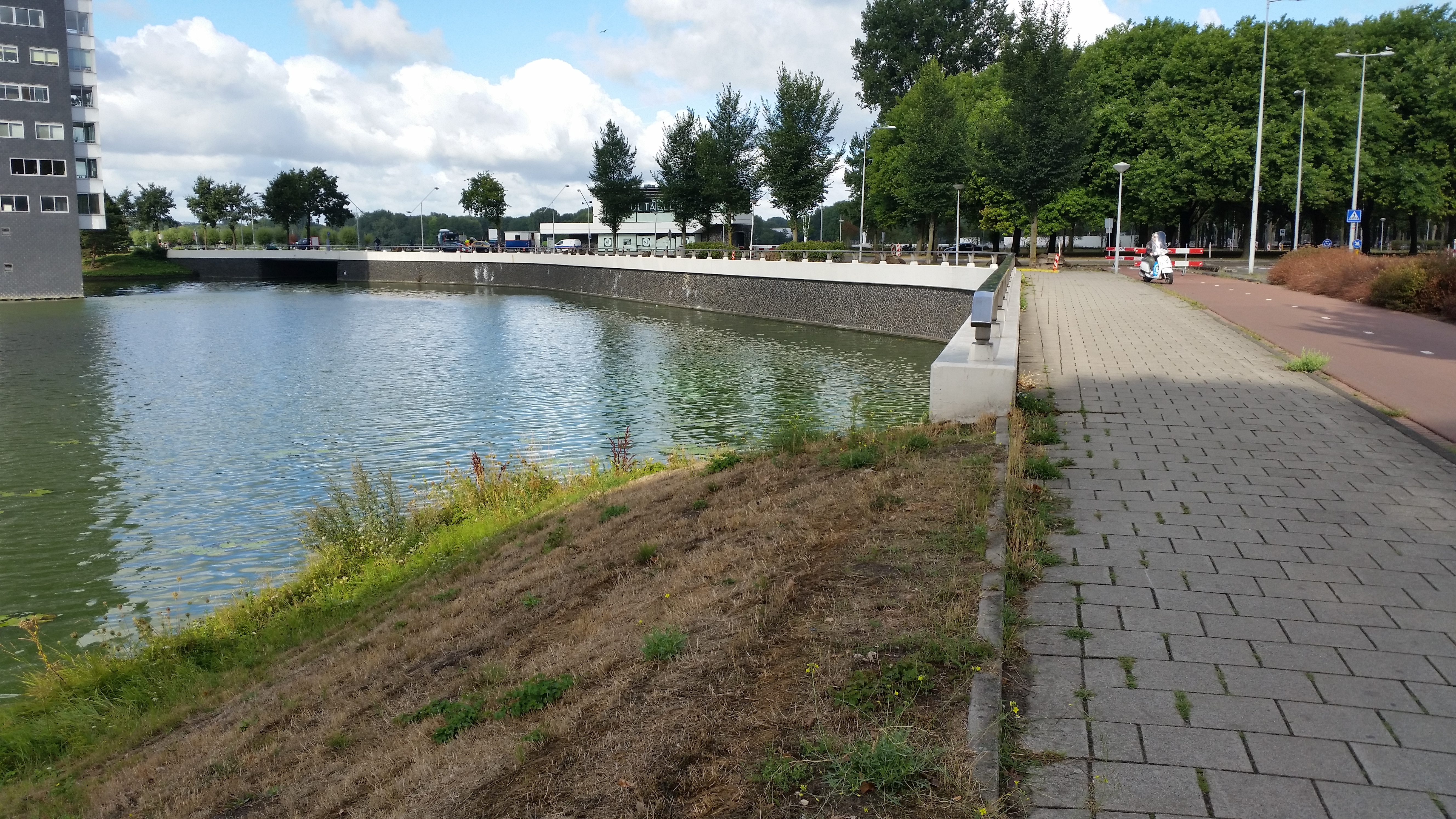 kade tussen brug 606 (rechts op voorgrond) naar brug 607 (links op achtergrond)